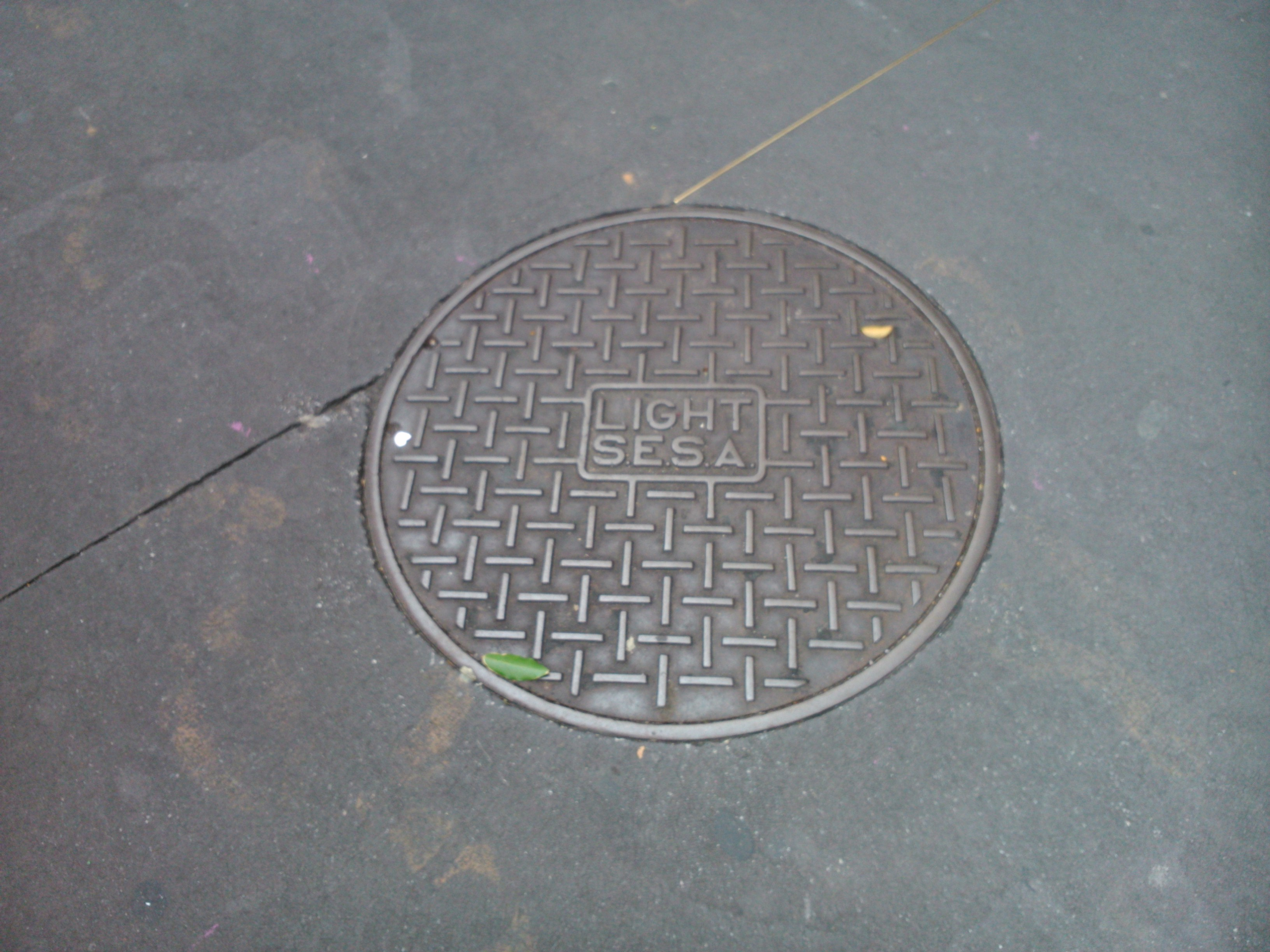 Poço de Inspeção da Light SESA (Light Serviços Elétricos S/A) na Avenida Paulista